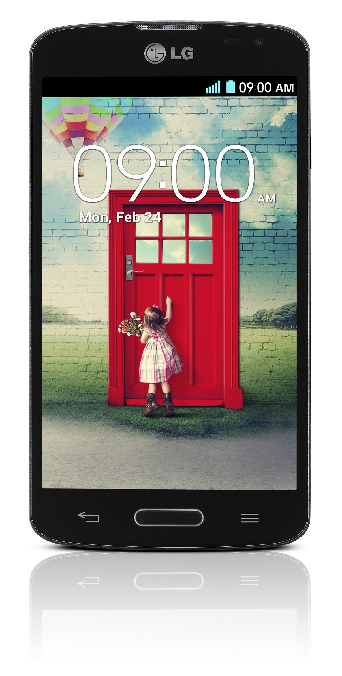 LG전자가 스페인 바르셀로나에서 열리고 있는 MWC 2014에서 보급형 LTE 스마트폰 ‘F시리즈’ 신제품을 공개했다. 'F70’은 프리미엄급 LTE 스마트폰에 적용된 하드웨어와 UX를 대거 탑재했다. ※ Social LG전자 에서 관련 보도자료를 확인하실 수 있습니다.